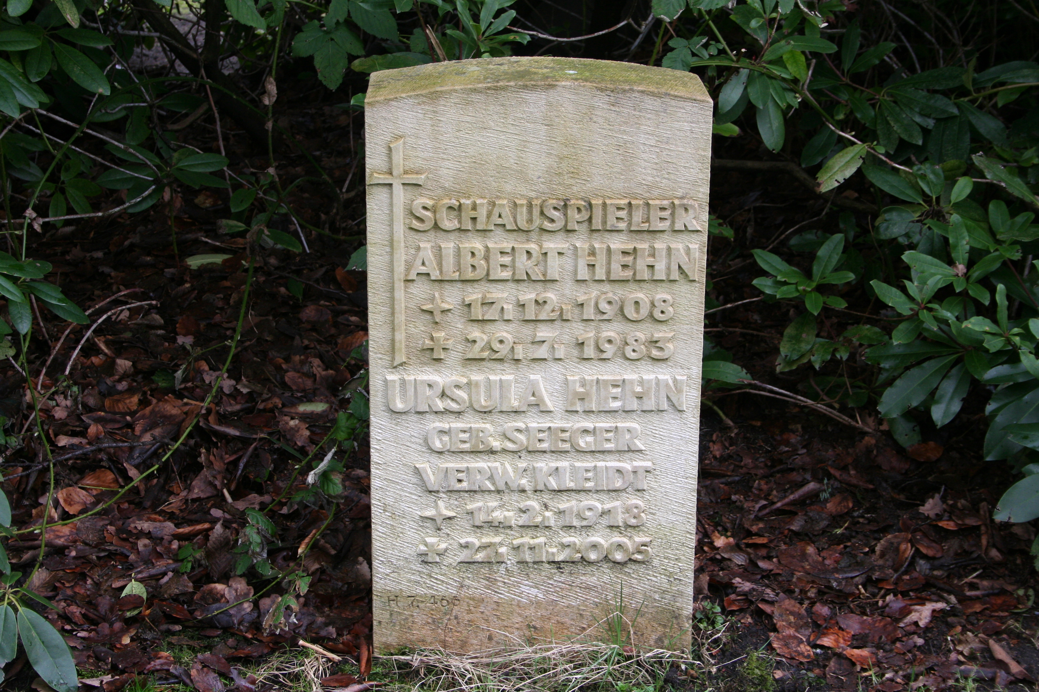 Grabstein Schauspieler Albert Hehn